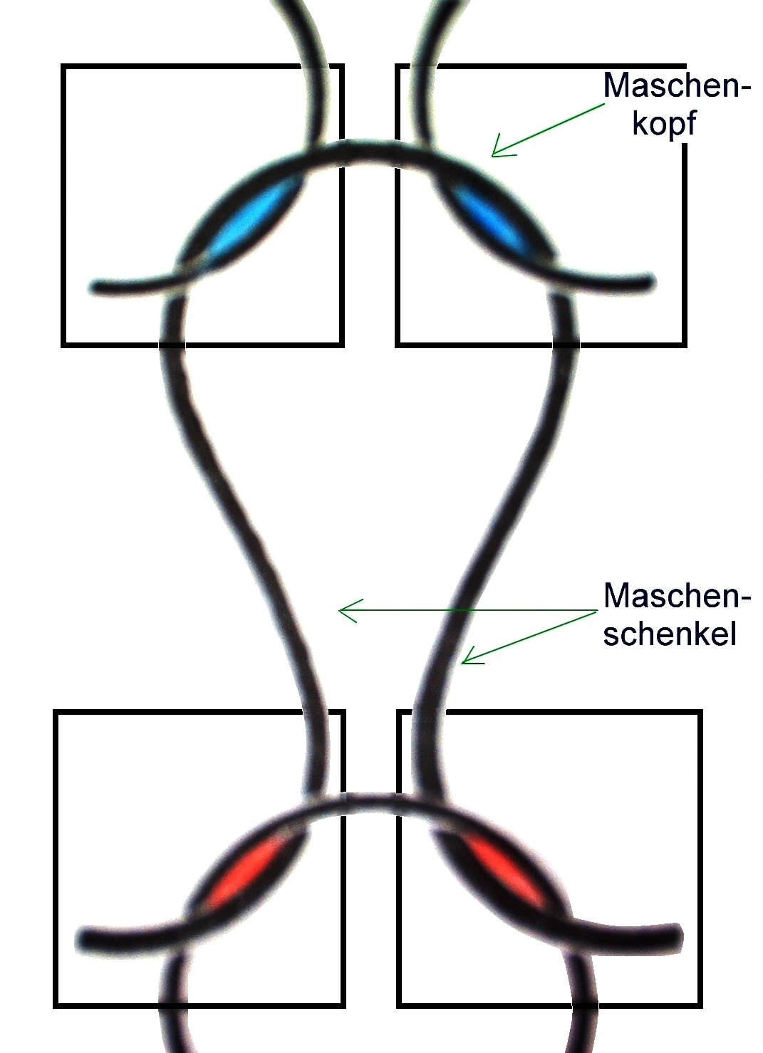 Fadenschleife